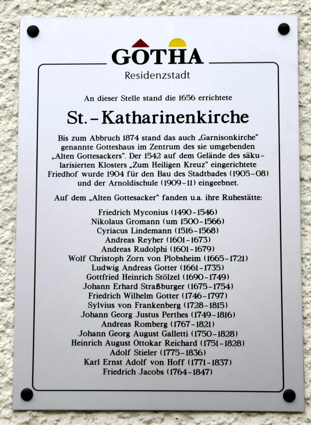 Infotafel an der ehem. Katharinenkirche in Gotha, heute Turnhalle der Arnoldischule.